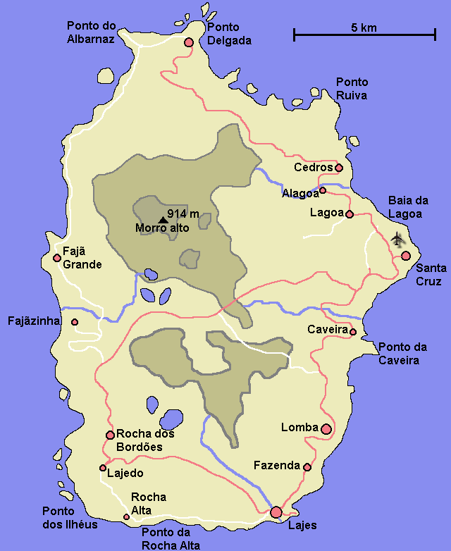 Karta över Flores i Azorerna. Ritad av Användare:Chrizz.